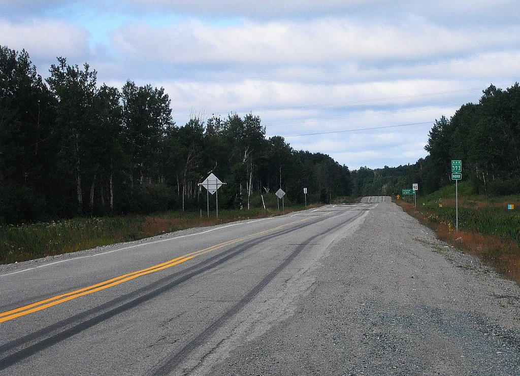 Vue sur la route 393, au nord de Rouyn-Noranda, en Abitibi.